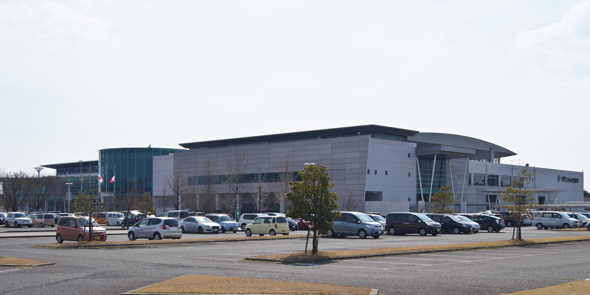 熊本産業展示場（グランメッセ熊本）